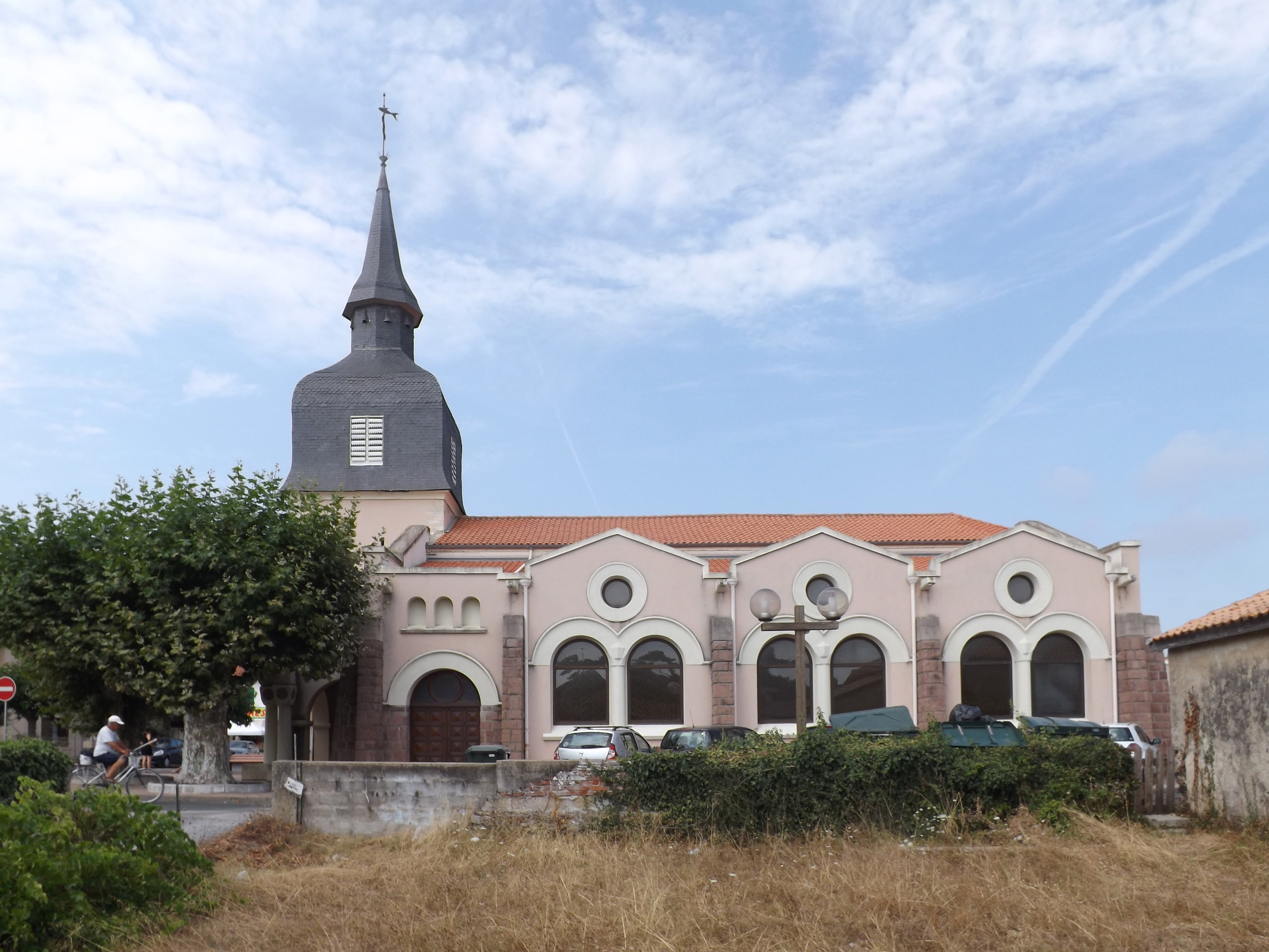 Glèisa de sent Clamenç deu Bocau Vielh, Maransin, Gasconha